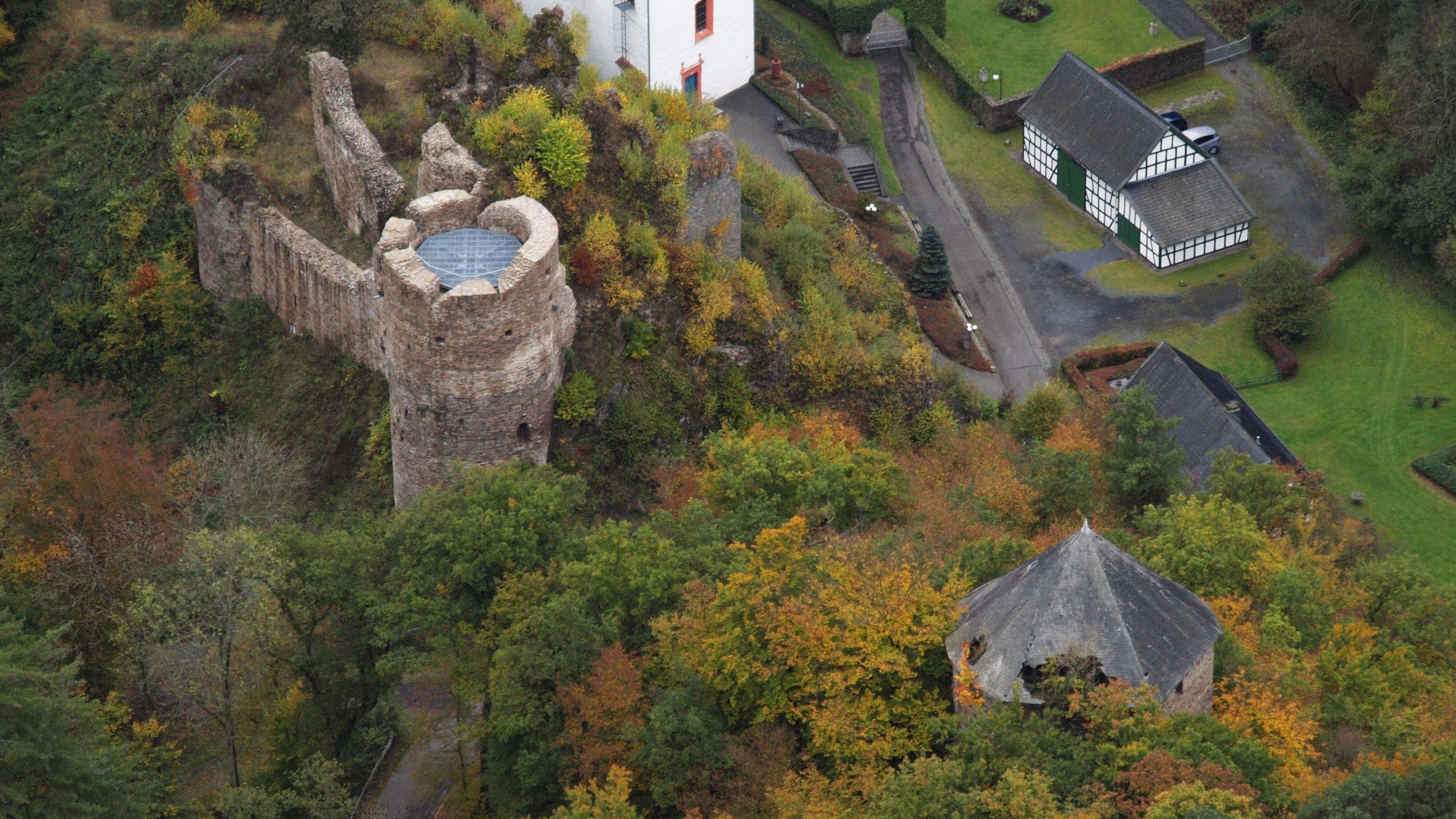 Burg Ehrenstein: Luftaufnahme